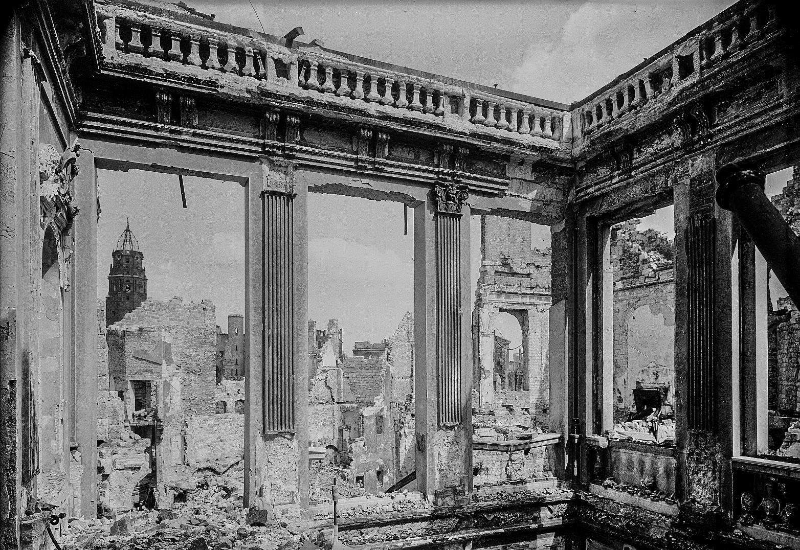 Das zerstörte Palais Oppenheim (Palais Kaskel-Oppenheim) in Dresden. Blick durch die Ruine der Treppenhalle Richtung Rathaus. Das Palais wurde 1845 bis 1848 von Gottfried Semper für den Bankier Martin Wilhelm Oppenheim (1781–1863) erbaut und befand sich an der Bürgerwiese 5–7. SLUB/Deutsche Fotothek der Sächsische Landesbibliothek - Staats- und Universitätsbibliothk Dresden